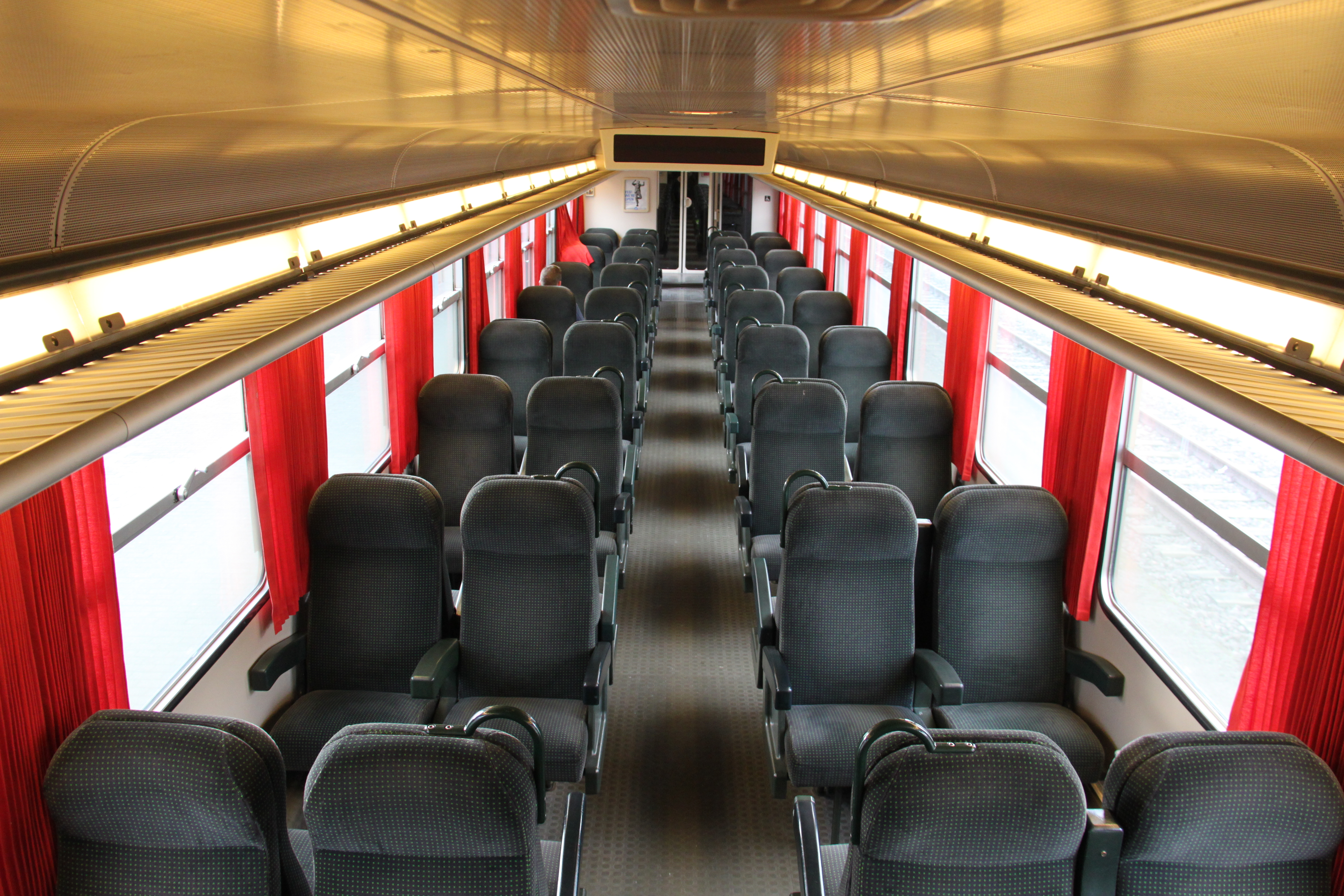 Interieur tweede klasse van een 2000-serie van de CFL.